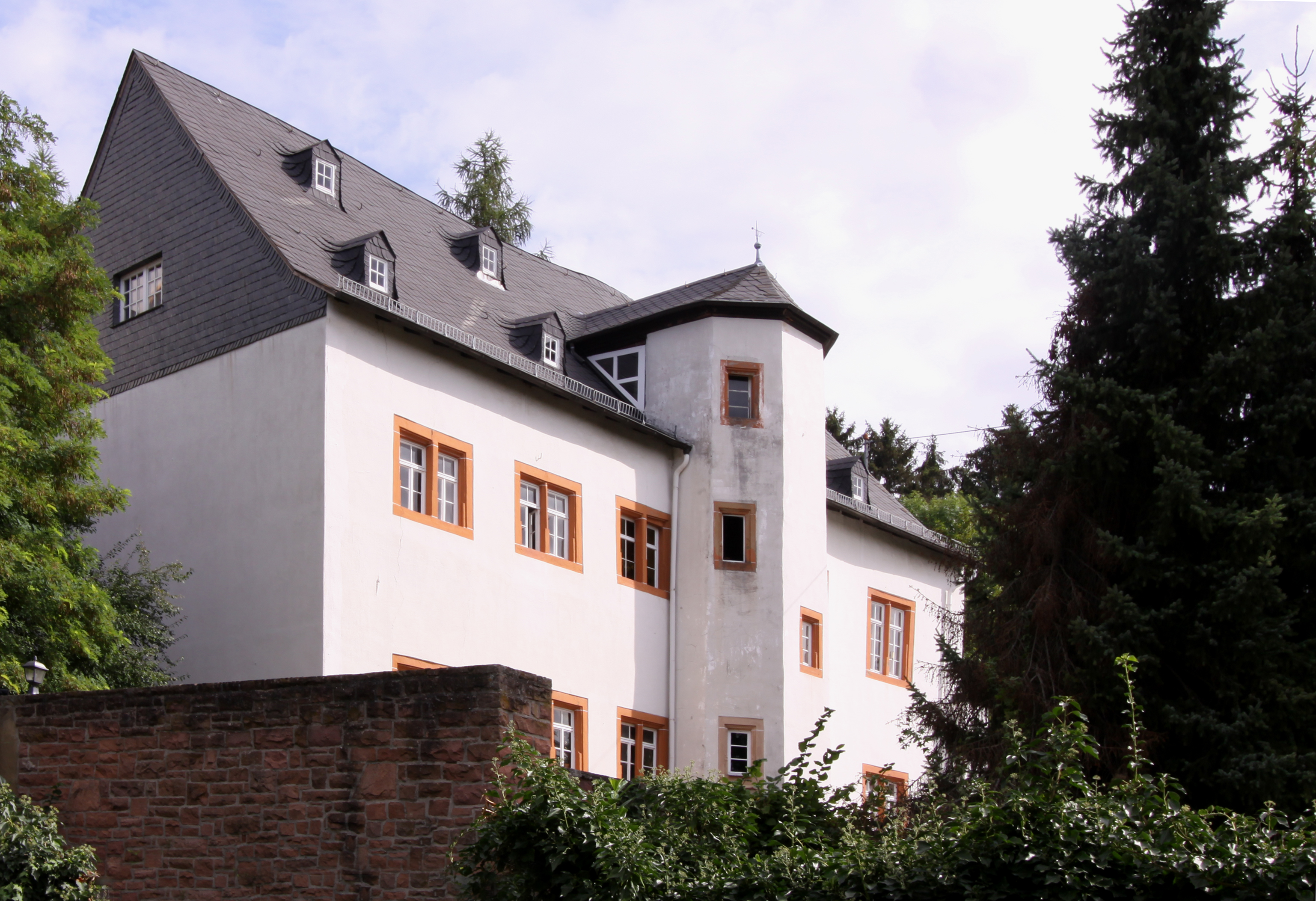 Mandel im Landkreis Bad Kreuznach/Deutschland - ehemaliges, von den Freiherren von Koppenstein Anfang des 17. Jh. erbautes Jagdschloss